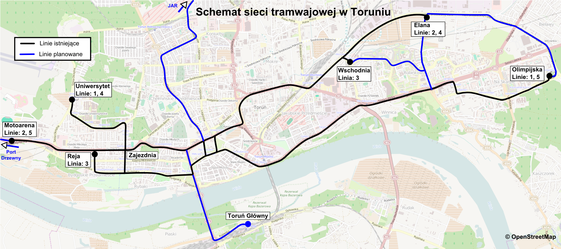 Siec tramwajowa w Toruniu, linie planowane